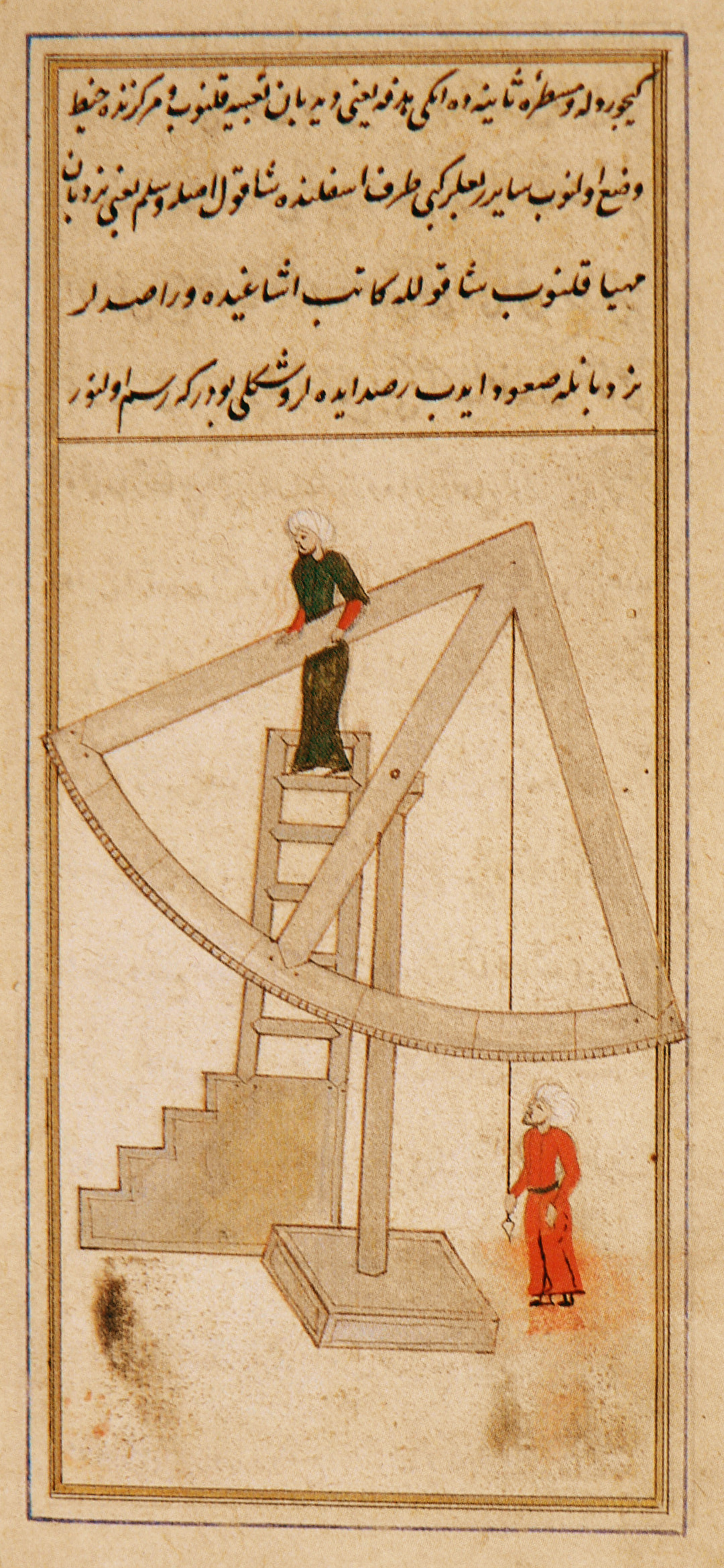 Quadrant bois de 4,5 m de diamètre (sic)